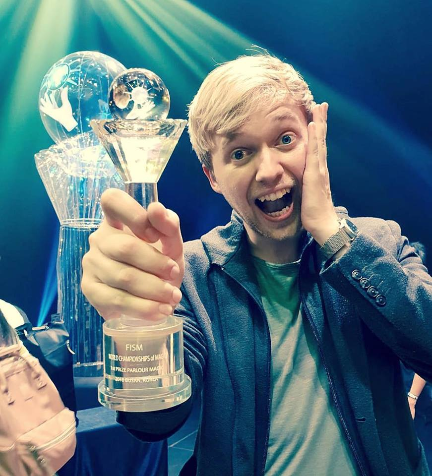 Marc Weide, Weltmeister der Zauberkunst 2018 Palor Magic